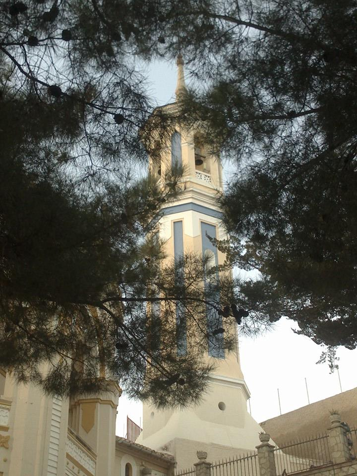 Torre del Santuario